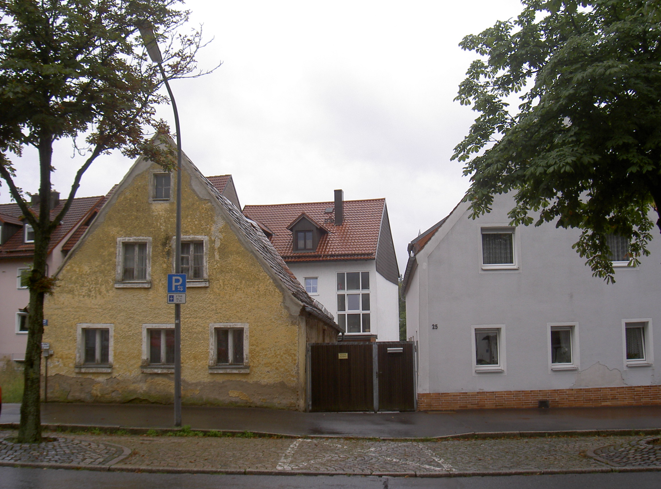 Freyung 25 (Neustadt an der Waldnaab), im kleinen gelben Haus, Freyung 23, befand sich eine Jeschiwa, im größeren hellblauen Haus, Freyung 25, befindet sich im Keller eine Mikwe